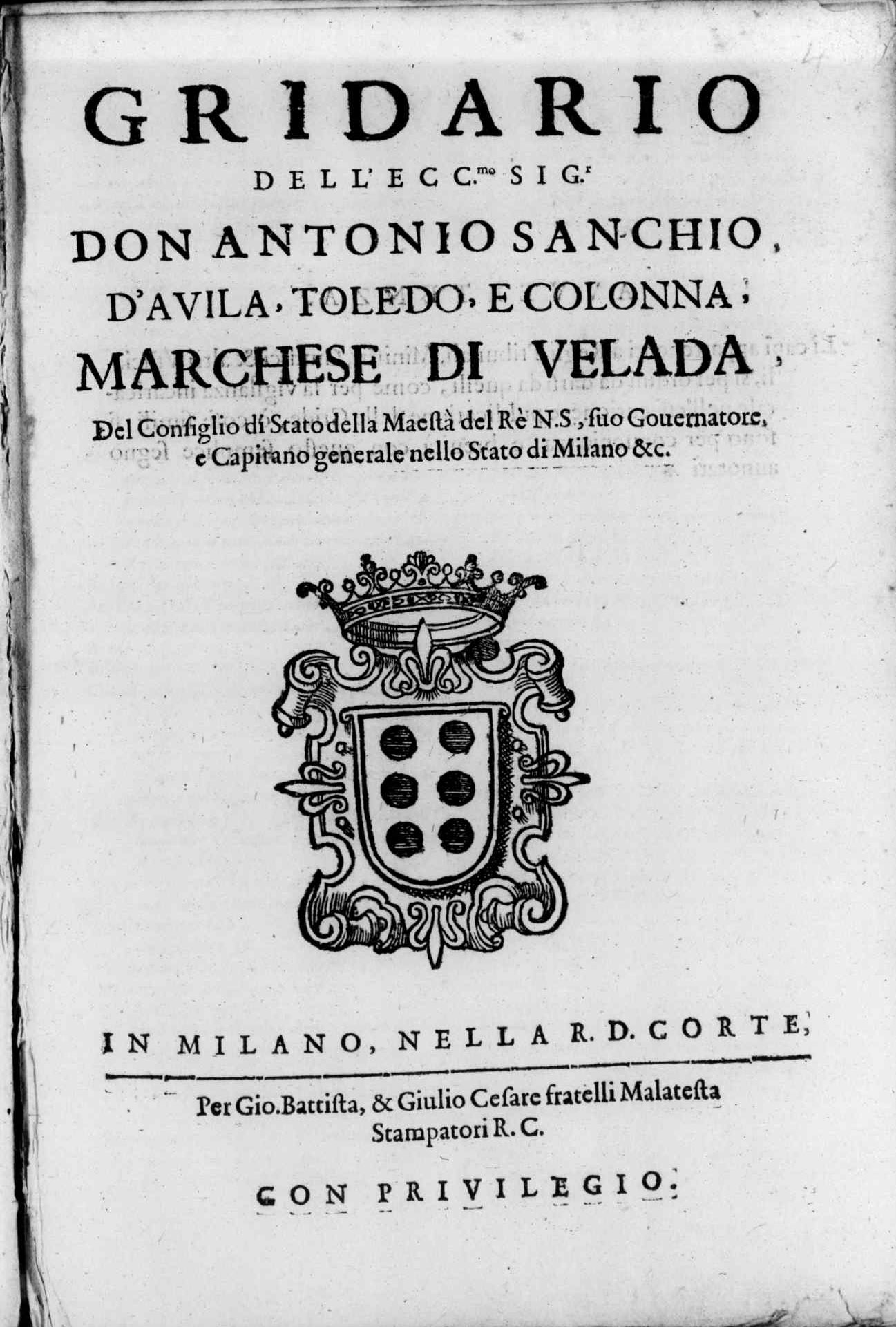 Frontespizio